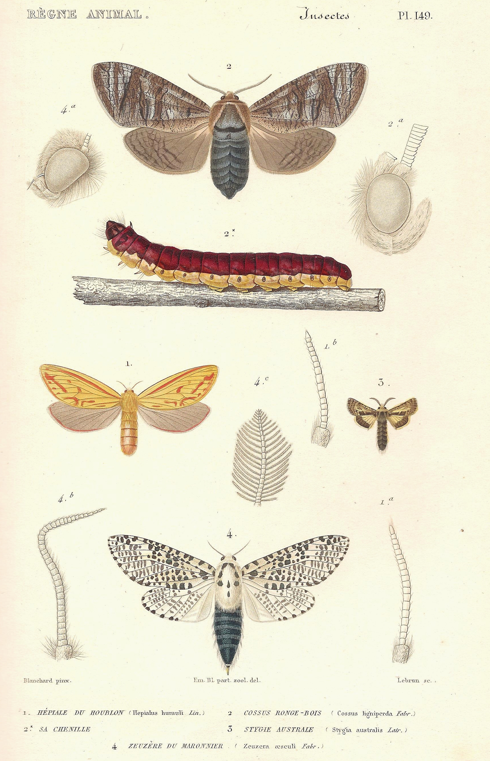 Planche N°149 du livre "Le règne animal distribué d'après son organisation" par Georges Cuvier (Tome 14), seconde édition de 1828, représentant : -en haut : Cossus ligniperda -au milieu : Hepialus humuli et Stygia australis -en bas : Zeuzera